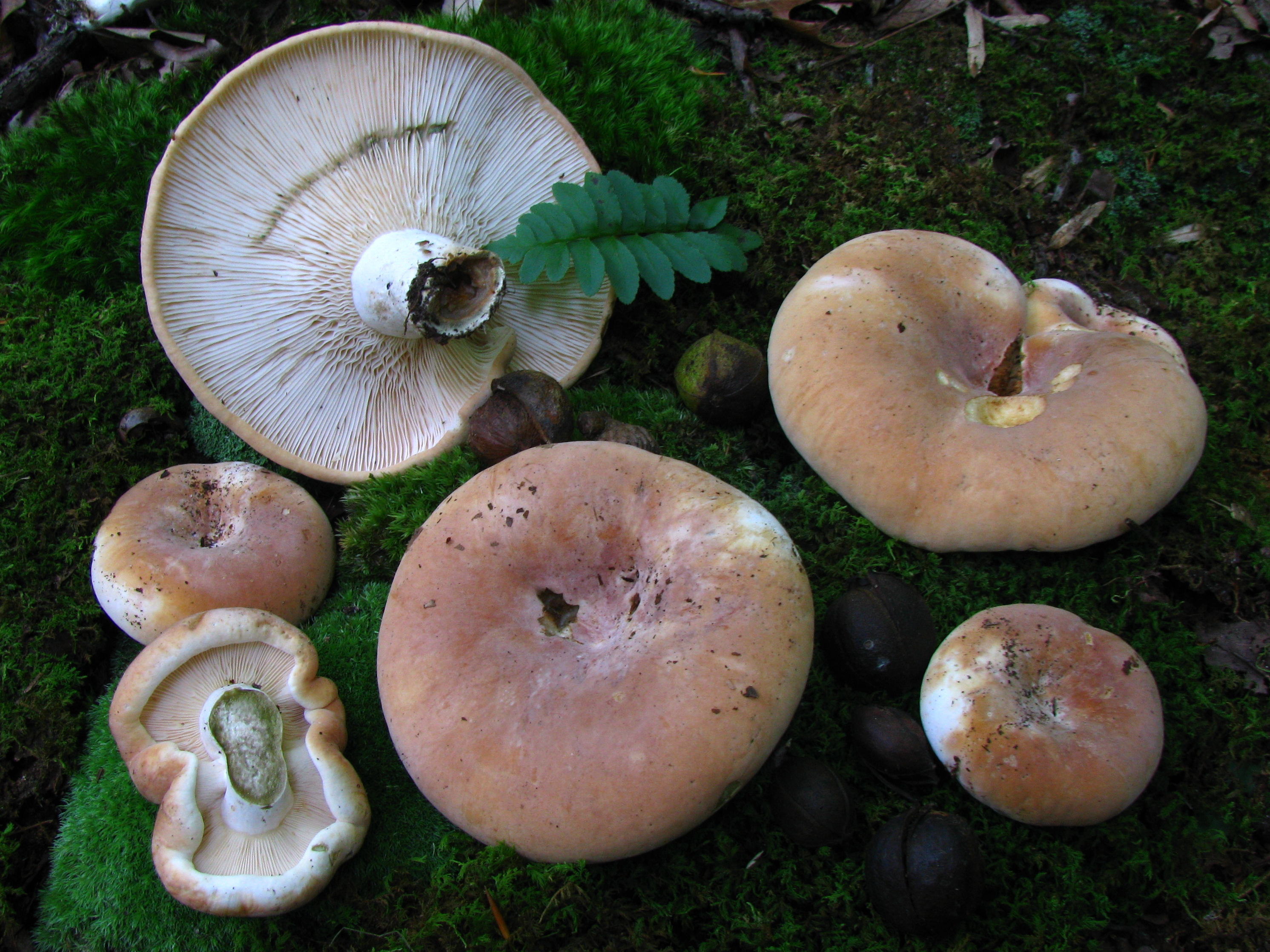 Lactarius allardii Coker